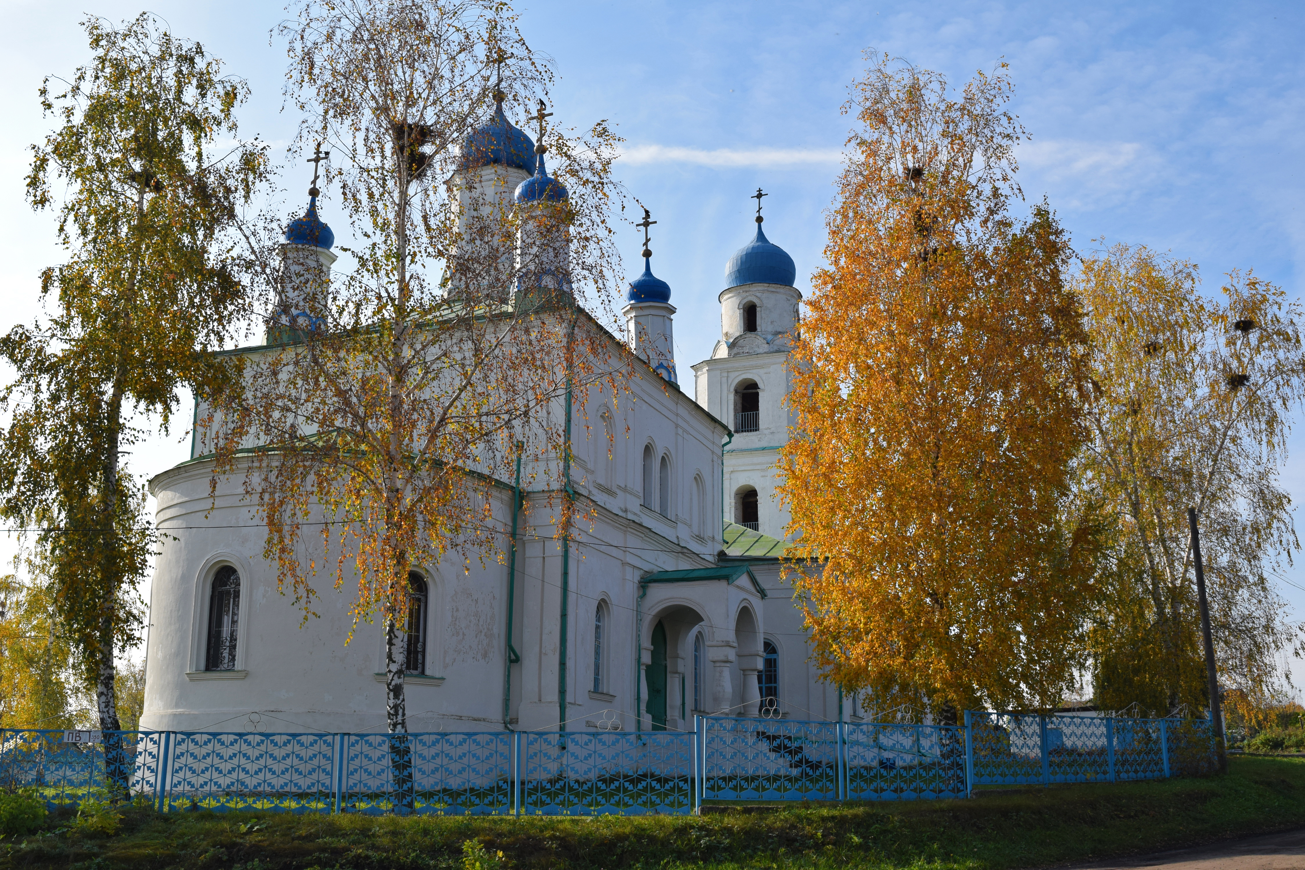 с.Казинка, Скопинский район, Рязанская область